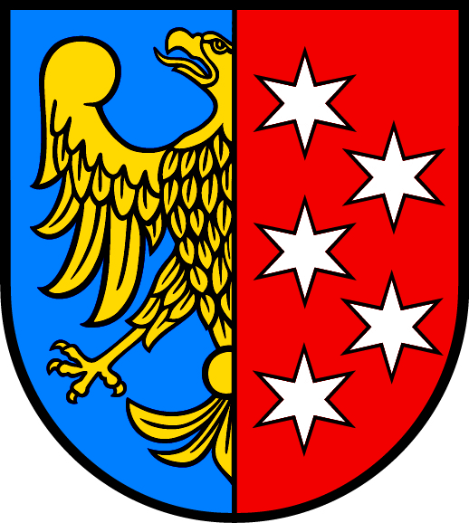 Herb Lublińca wg załącznika do uchwały 193/XIX/2016 Rady Miejskiej w Lublińcu z dnia 25 lutego 2016 w sprawie ustanowienia herbu i flagi Miasta Lublińca oraz zasad ich używania